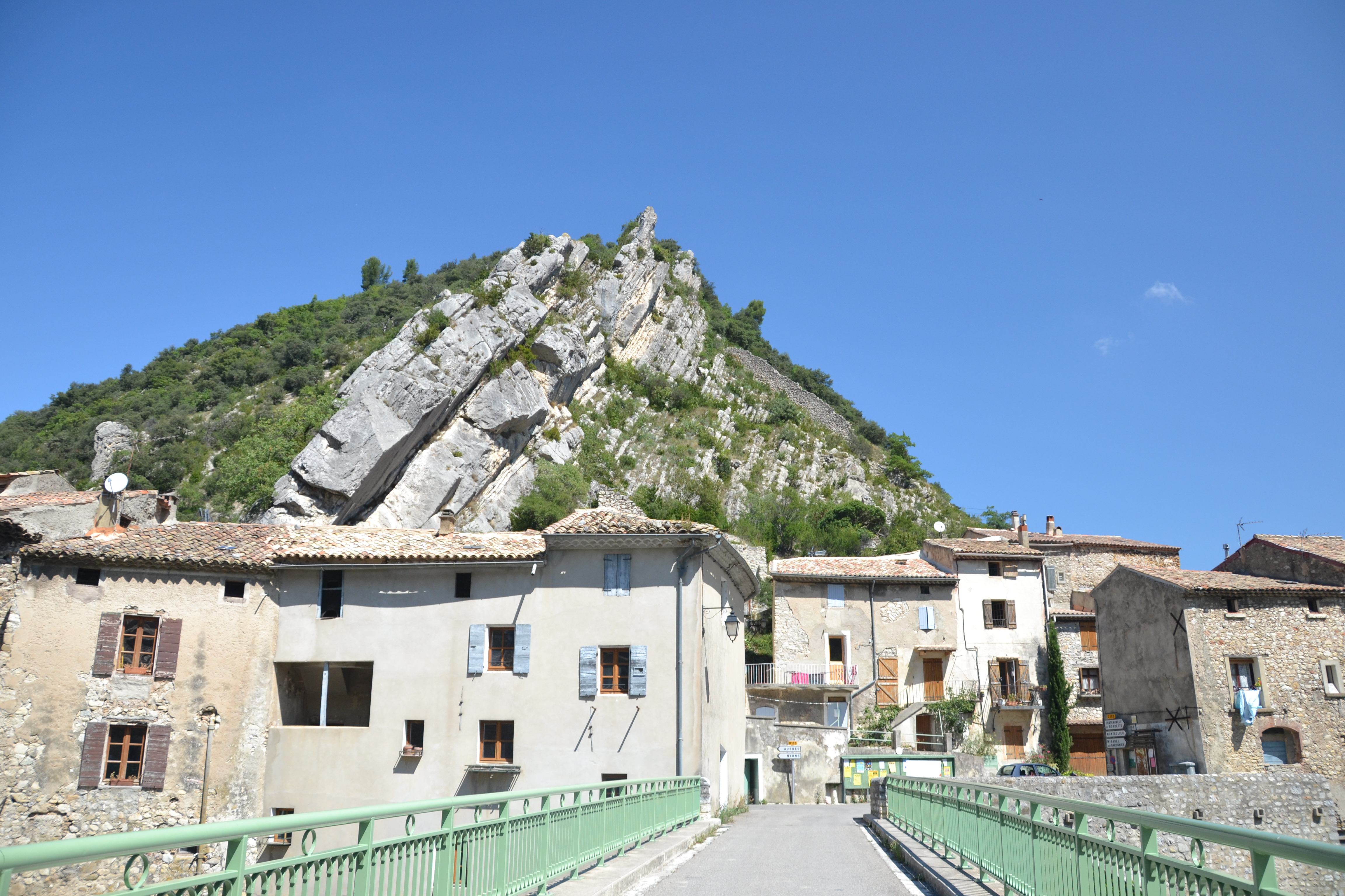 Les Pilles et rives de L'Eygues